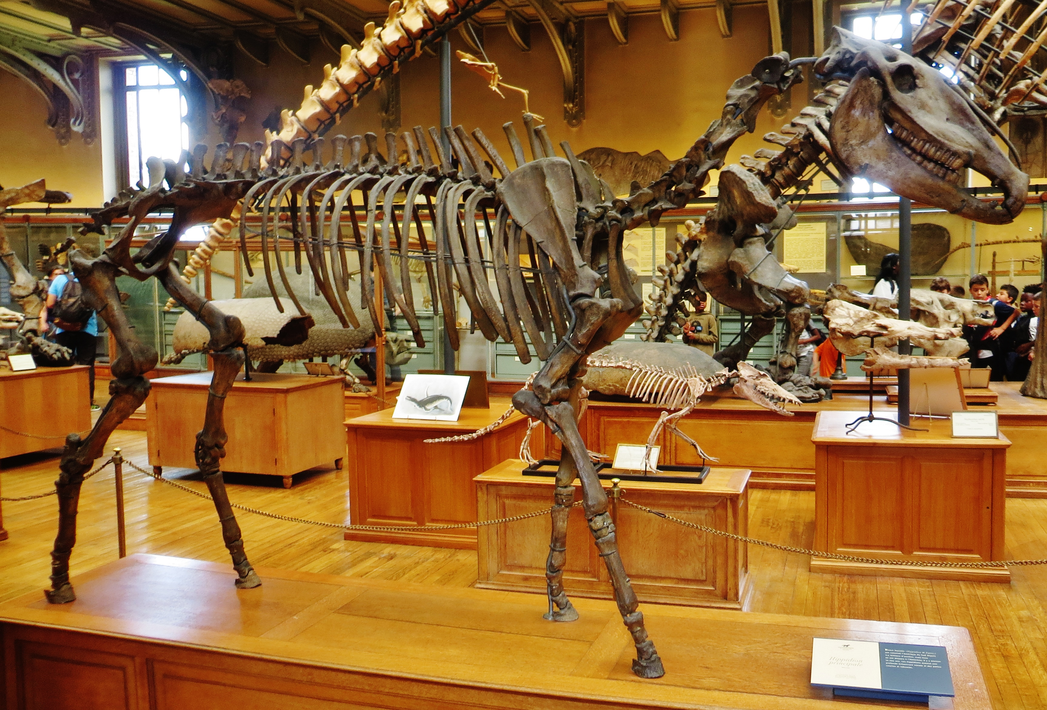 Fossil horse